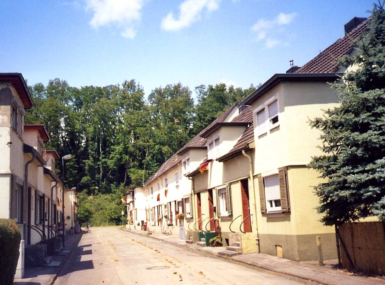 Straße in Eschweiler-Ost mit typischen Bergarbeiterhäuschen und der begrünten Kippe im Hintergrund